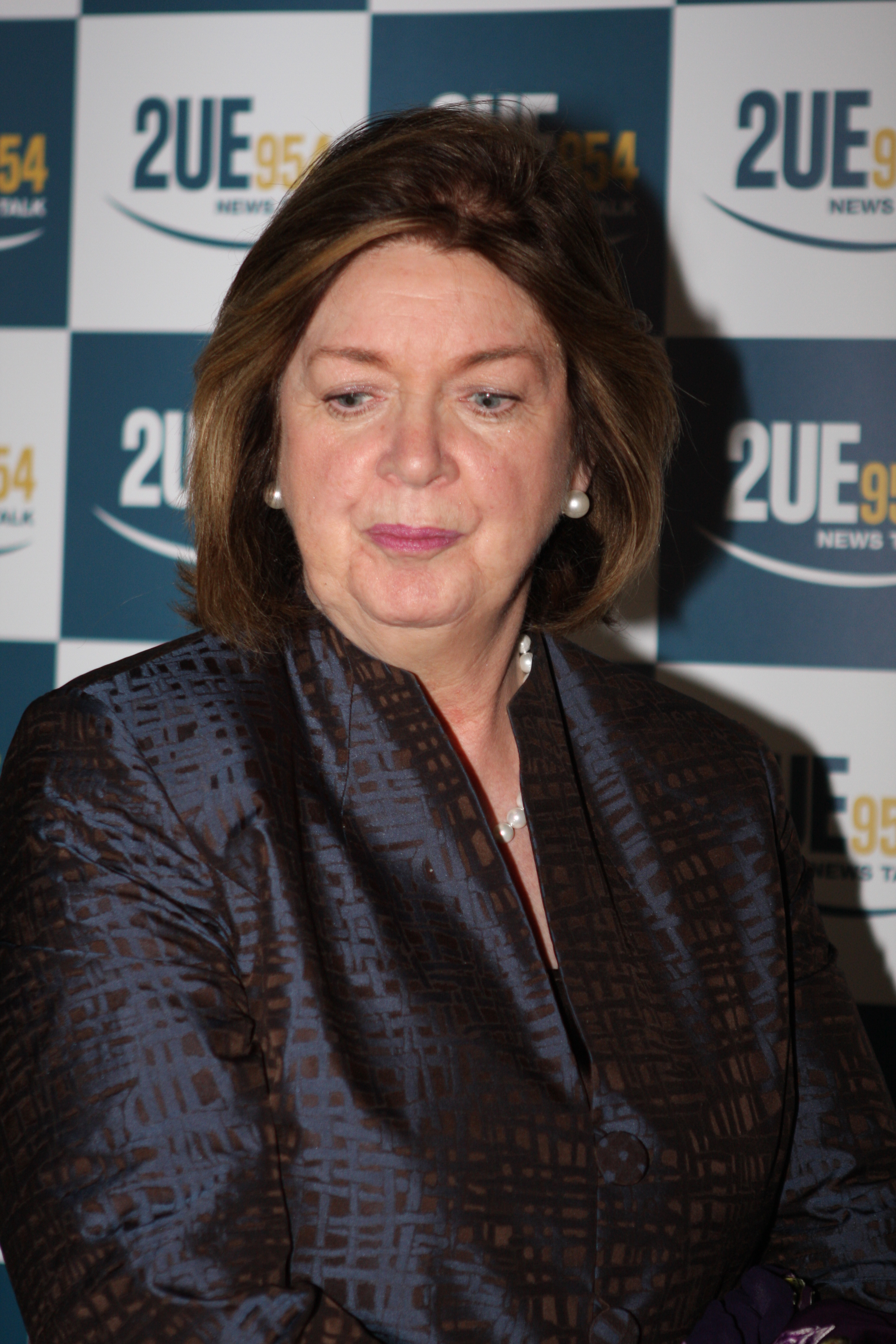 Margaret Humphreys